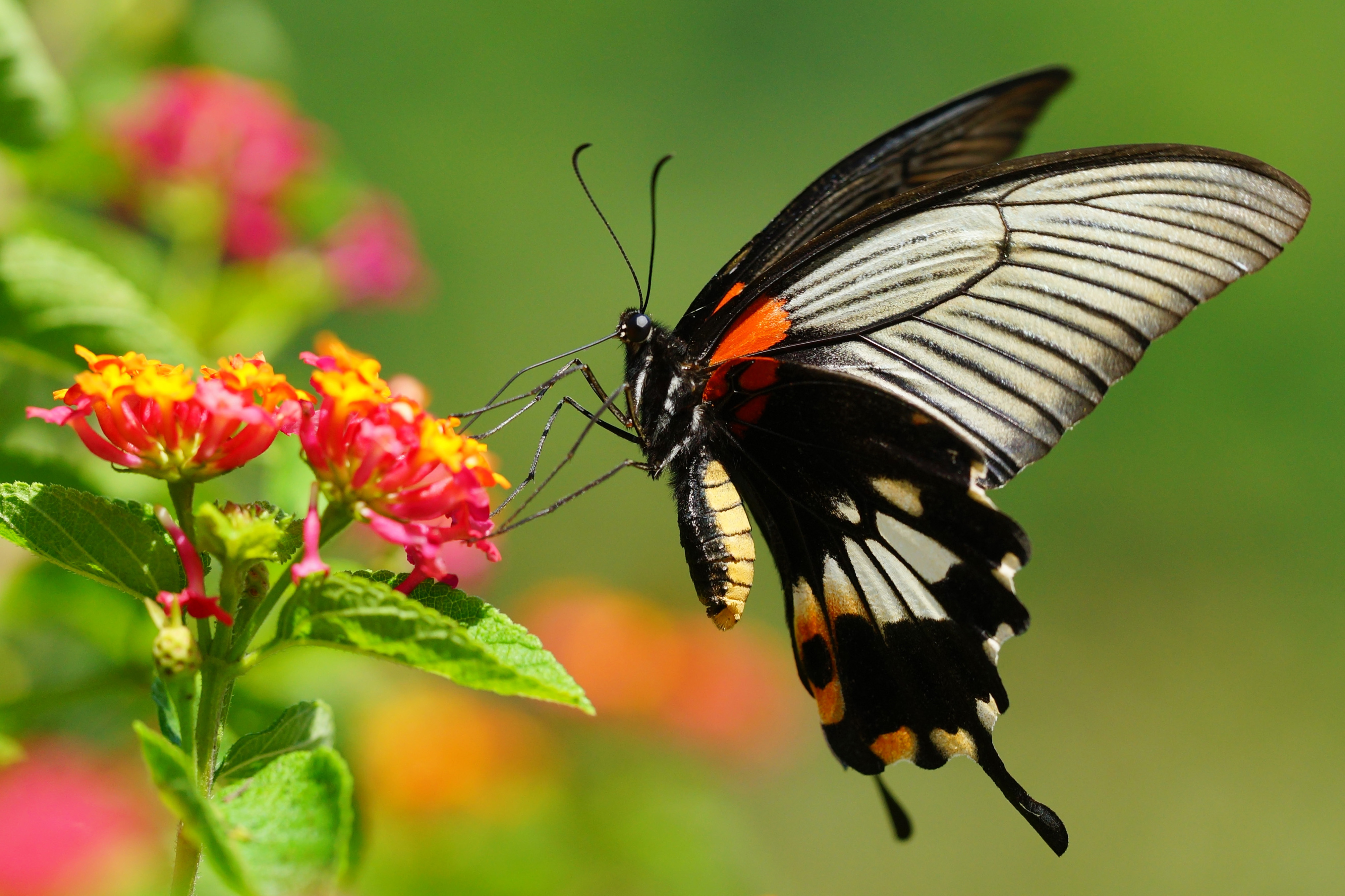 大鳳蝶 Papilio memnon heronus